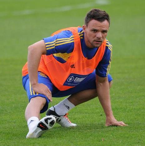 Микола Морозюк - український футболіст у складі національної збірної.